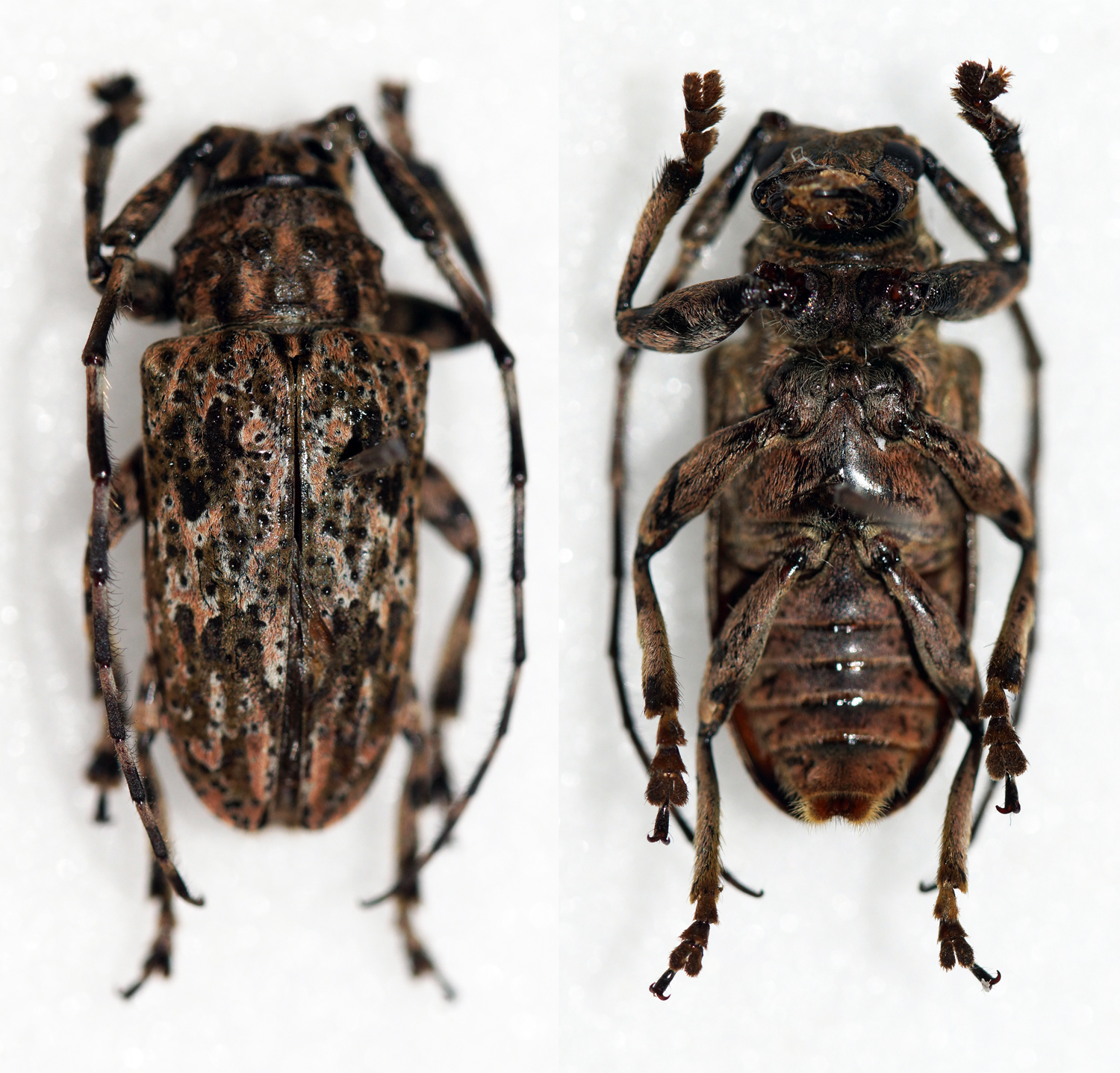 Newman,1842 Sex: Male Data: 04-2014 - Bangalasan - Bukidnon - Mindanao - Philippines Size: 17.5mm